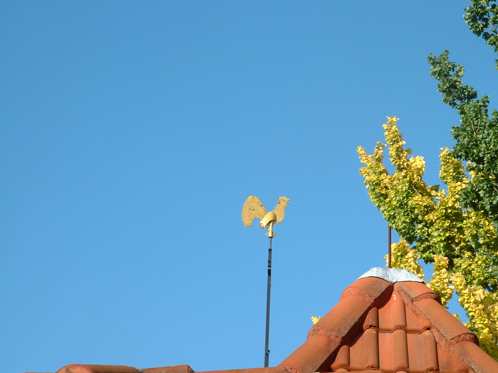 hahn